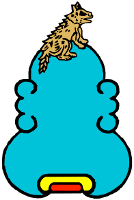 El Glifo de Coyotepec